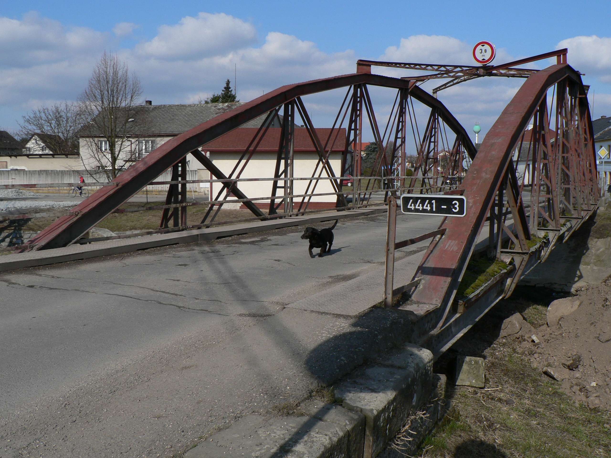 Železný most v Moravičanech (1888, firma bratří Kleinů)